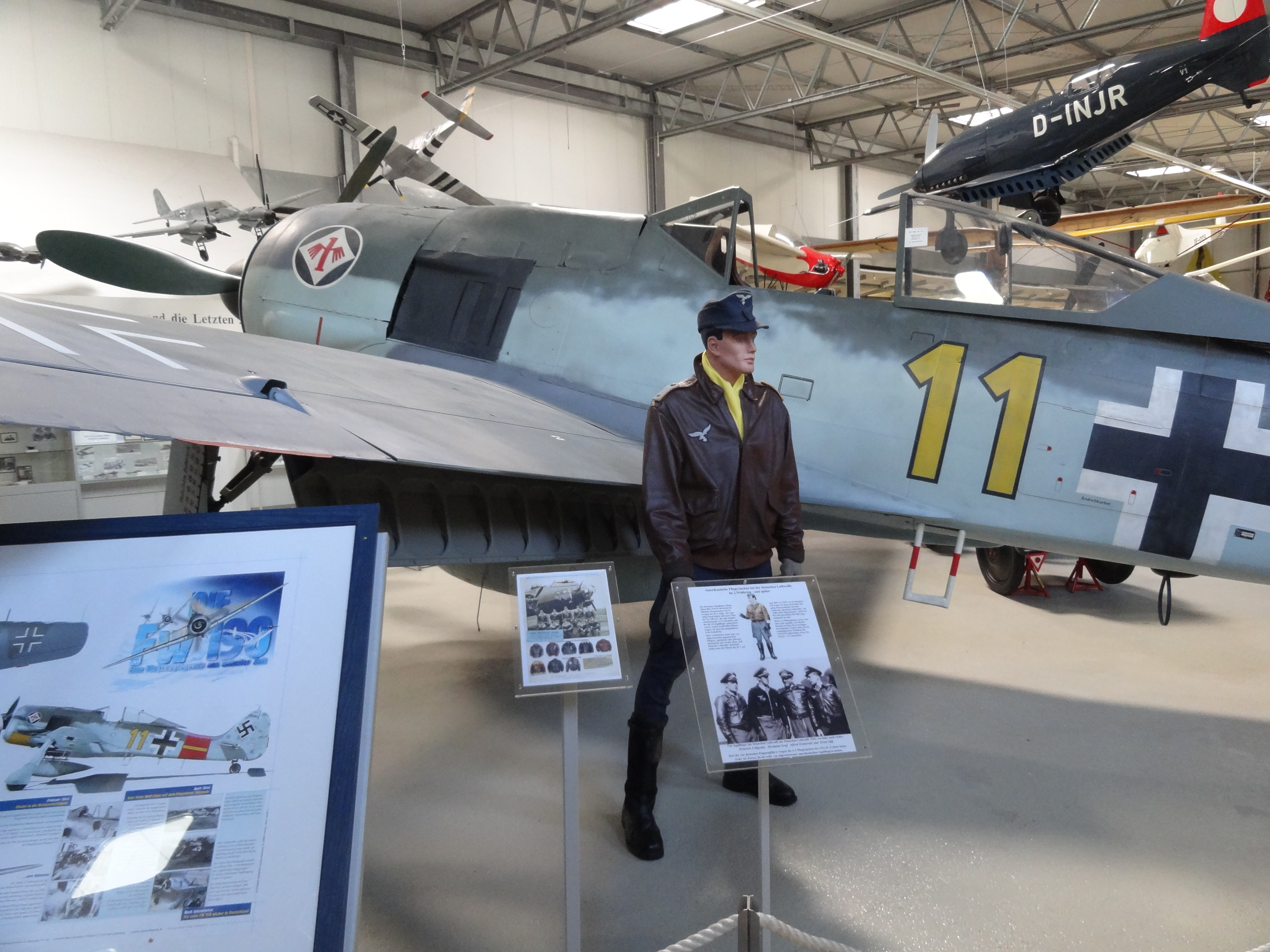 Fw 190 A8, Luftfahrtmuseum Hannover-Laatzen